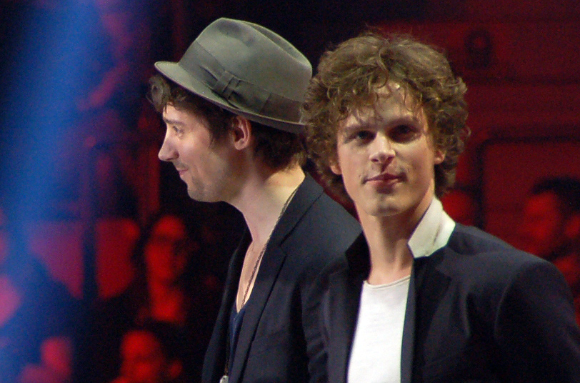 Adam Lundgren och Adam Pålsson - Huvudpersonerna i Jonas Gardells TV-serie Torka aldrig tårar utan handskar. Bilden tagen under P3 Guld-galan 2013.